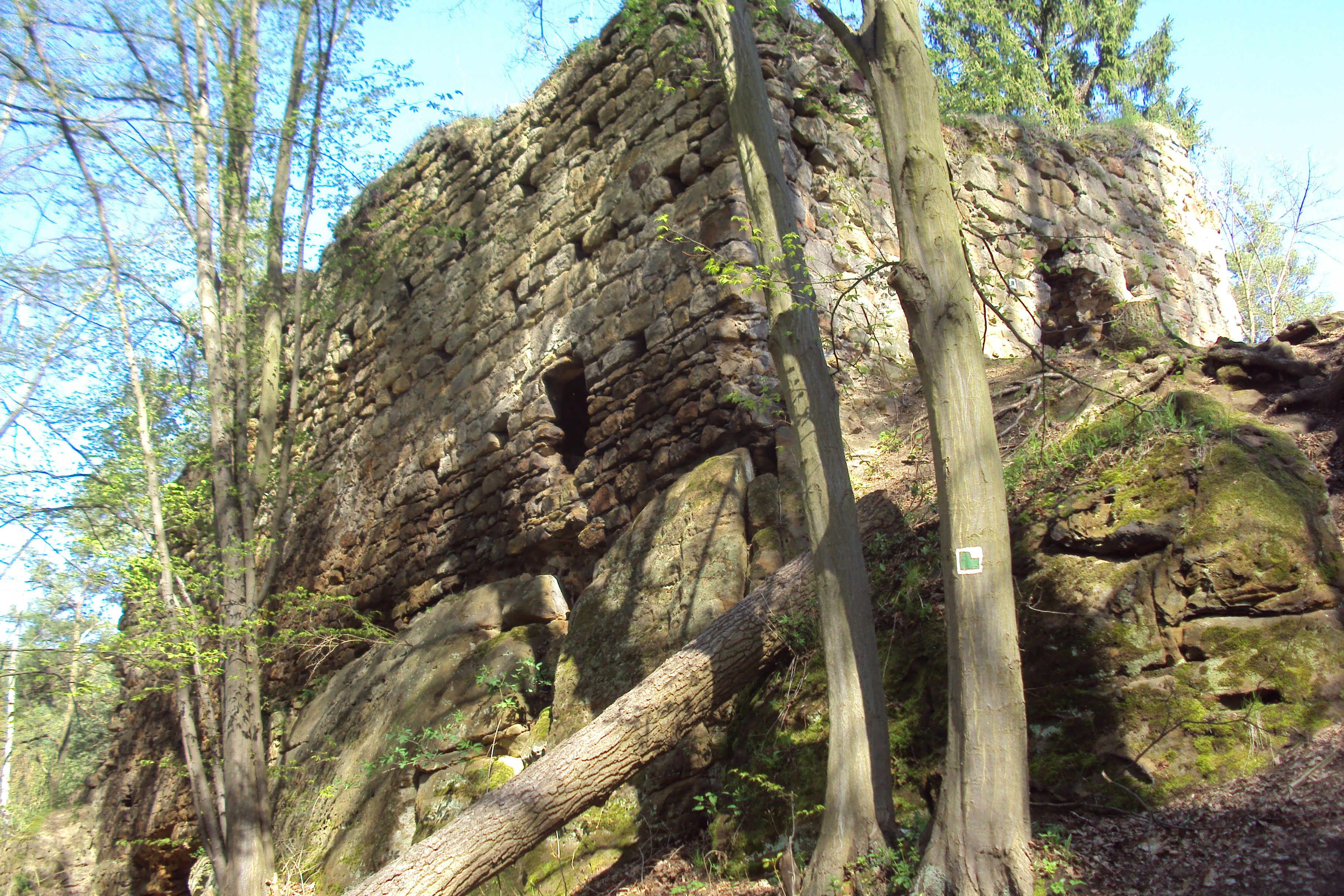 Ruiny hrádku mezi Holany a Dřevčicemi